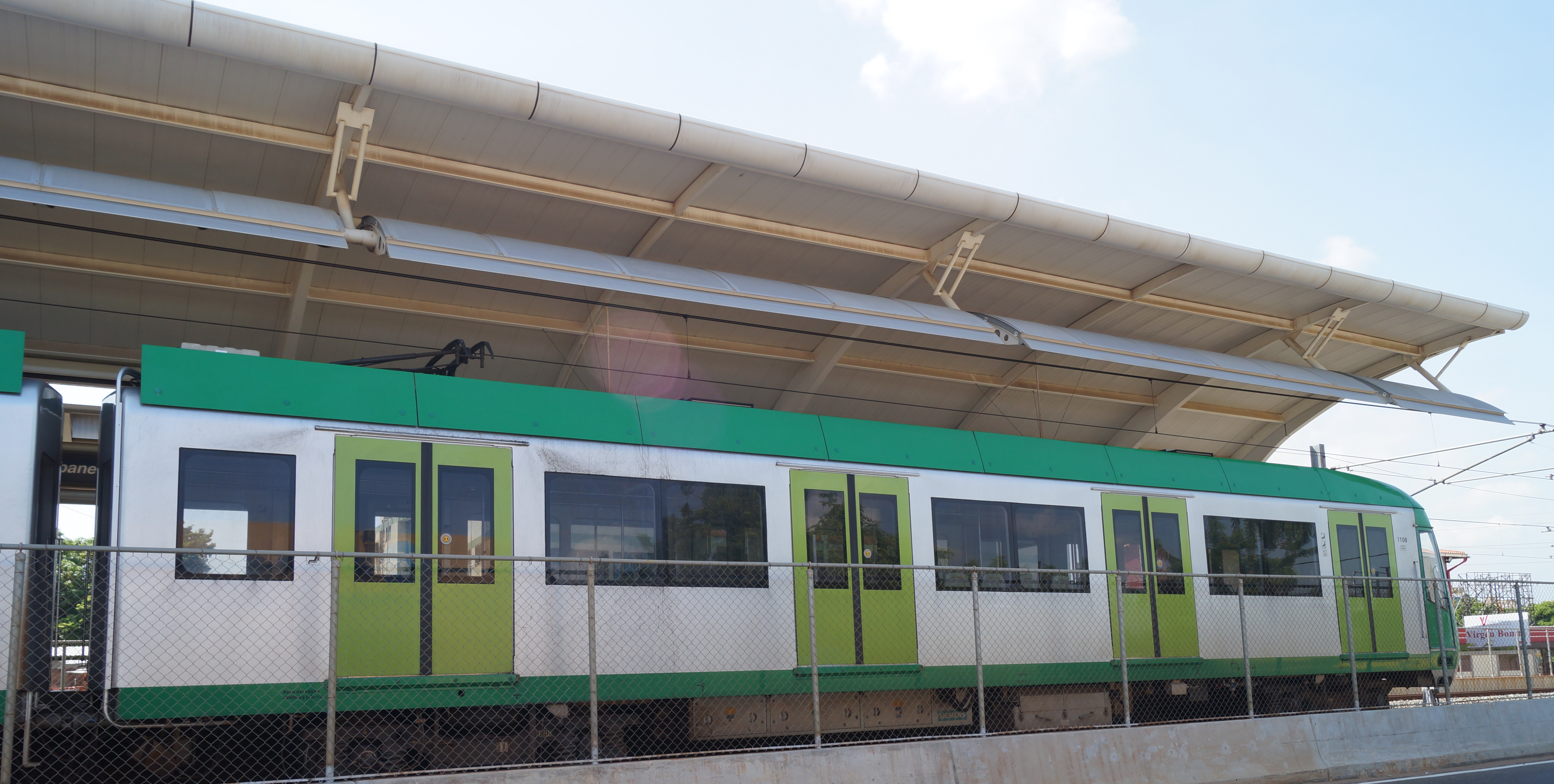 Metro de Maracaibo